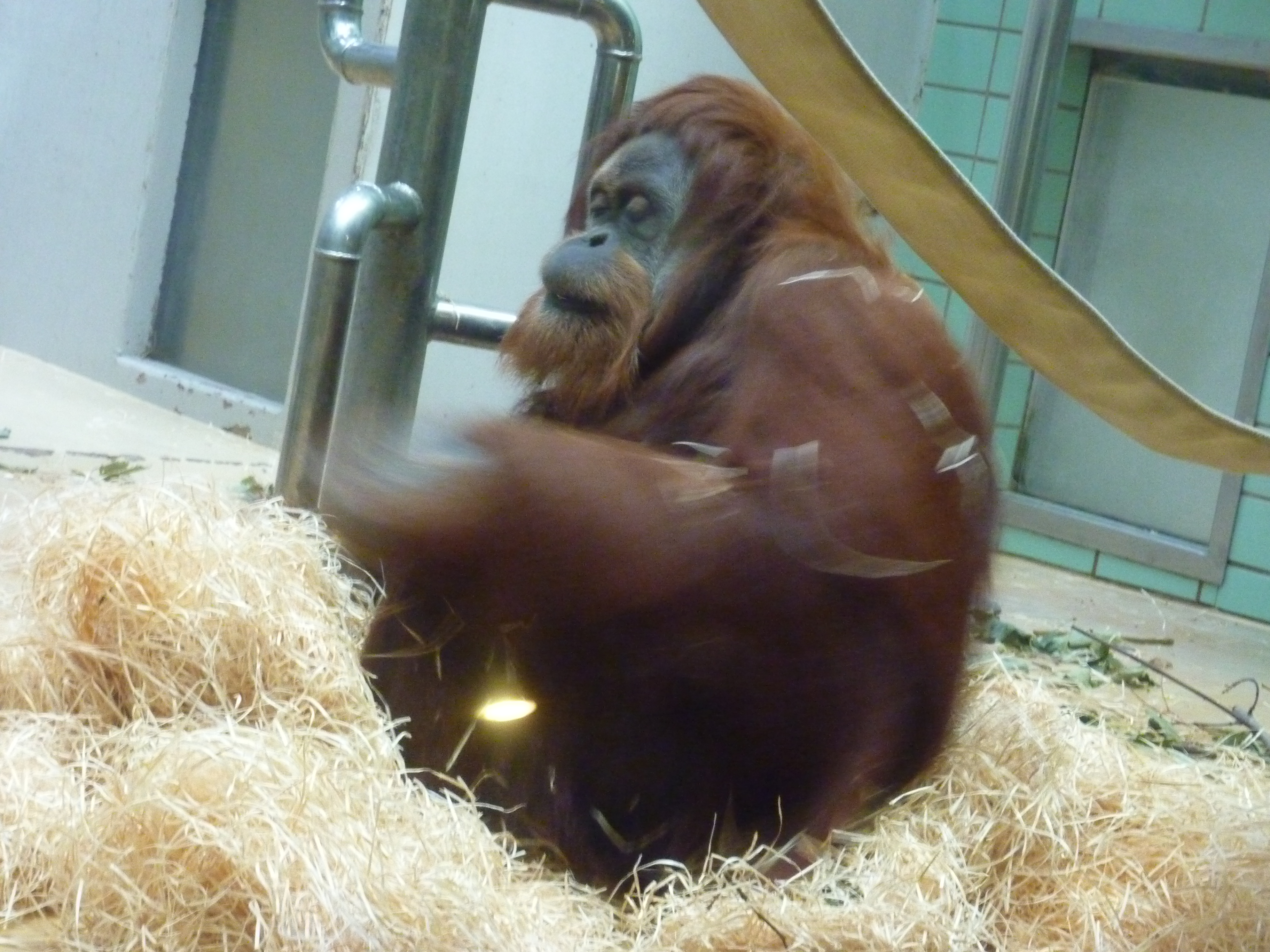 Orang Utan im Menschenaffenhaus der Wilhelma; die Anlage wird ersetzt